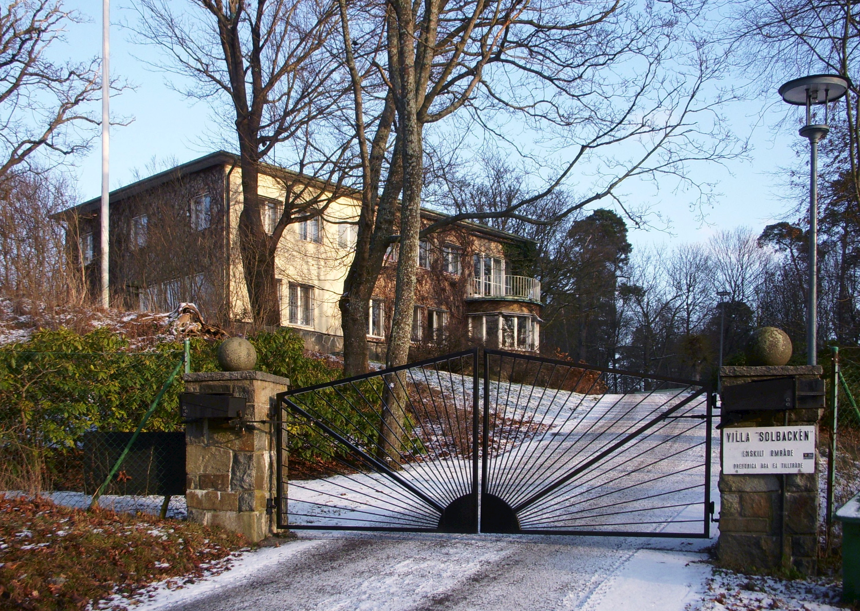 "Villa Solbacken" på Gärdet, Stockholm